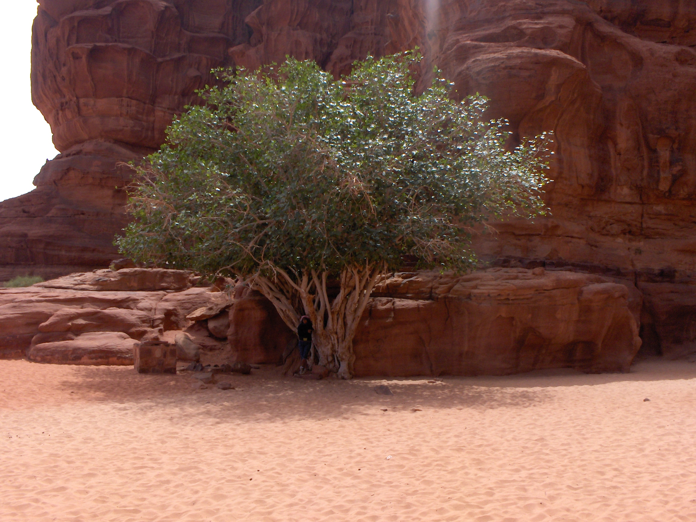 Un albero vicino alle gole del Wadi Rum